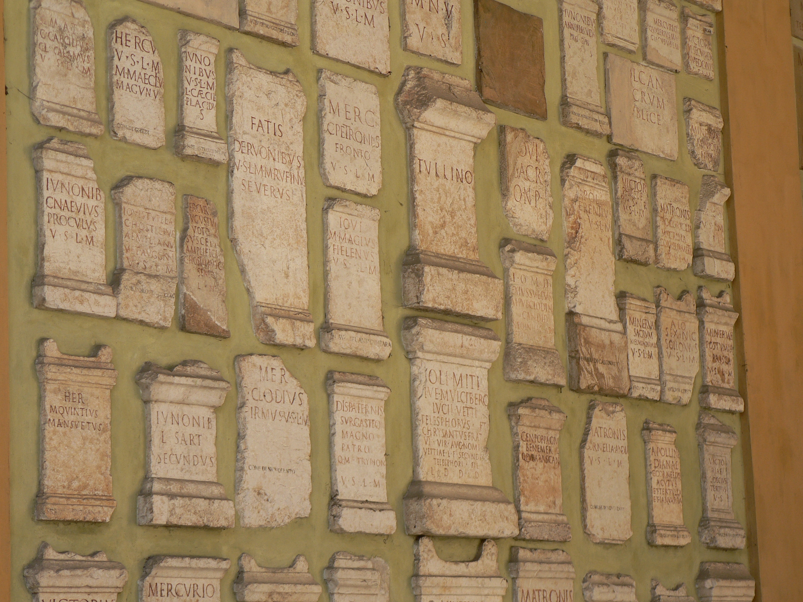 Il lapidarium del Tempio Capitolino di Brescia: collezione di are romane. CIL V 4160 (Manerbio): Mat(ronis)/ C(aius) Caecilius/ C(ai) l(ibertus) Calamus/ v(otum) s(olvit) l(ibens) m(erito) CIL V 4155 (Ghedi): Hercul[i]/ v(otum) s(olvit) l(ibens) m(erito)/ M(arcus) Maeclius/ Magunus CIL V 4222 (Brescia): Iuno/nibus / v(otum) s(olvit) l(ibens) m(erito) L(ucius) Caecil(ius) / Placidu/s CIL V 4157 (Manerbio): Iunonib(us)/ C(aius) Naevius/ Proculus/ v(otum) s(olvit) l(ibens) m(erito) CIL V 4243 (Brescia): Iovis Tutelae/ C(aius) Hostilius/ Aemilianu[s]/ vet(eranus) Augg(ustorum) nn(ostrorum)/ v(otum) s(olvit) l(ibens) m(erito) CIL V 4161 (Ghedi): [M]ercuri[um]/ [A]ugustum/ voto/ suscepto/ amplificavi[t]/ C(aius) Hostilius C(ai) f(ilius)/ Seneca/ l(ibens) m(erito) CIL V 4208 (Brescia): Fatis/ Dervonibus/ v(otum) s(olvit) l(ibens) m(erito) M(arcus) Rufinius/ Severus CIL V 4265 (Brescia): Merc(urio)/ C(aius) Petronius/ Fronto/ v(otum) s(olvit) l(ibens) m(erito) CIL V 4230 (Brescia): Iovi/ M(arcus) Magius/ Helenus/ v(otum) s(olvit) l(ibens) m(erito) CIL V 4914 (Inzino): Tullino CIL V 4231 (Brescia): [I]ovi/ sacr(um)/ Q(uintus) N P CIL V 4242 (Brescia): I(ovi) O(ptimo) M(aximo) D(olicheno)/ ex iussu eius/ M(arcus) Pub(licius?) Clodian(us)/ candidat(us)/ ne qu(is) in hac ara/ setatu(m) sac(rificare) rit(e) v[e]li[t] CIL V 4198a (Brescia): Apol(lini)/ [- T]erentius/ v(otum) s(olvit) l(ibens) m(erito)